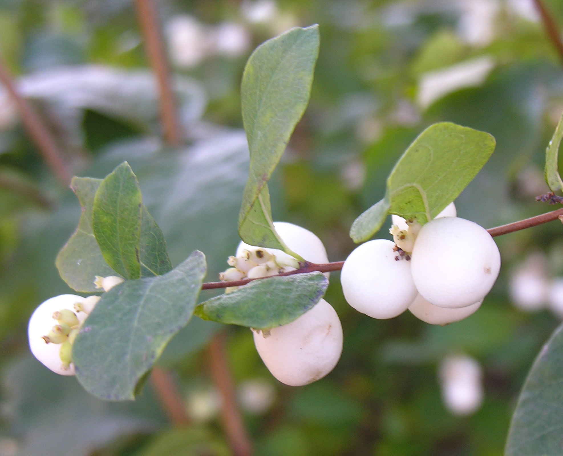 Baltauogė meškytė (Symphoricarpos albus) Fam. Caprifoliaceae Foto: Algirdas, 2005 m. spalio 28 d., Lietuva